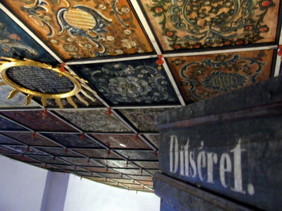 Drávaiványi templomának belseje